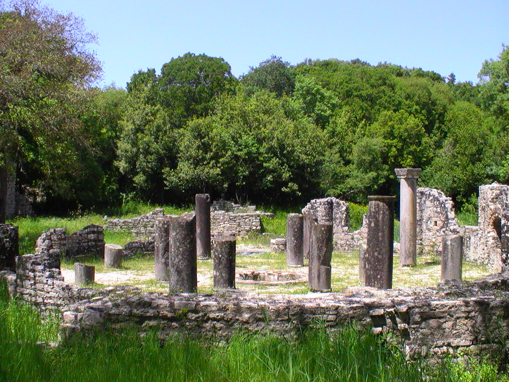 Butrint, Albania: baptistery